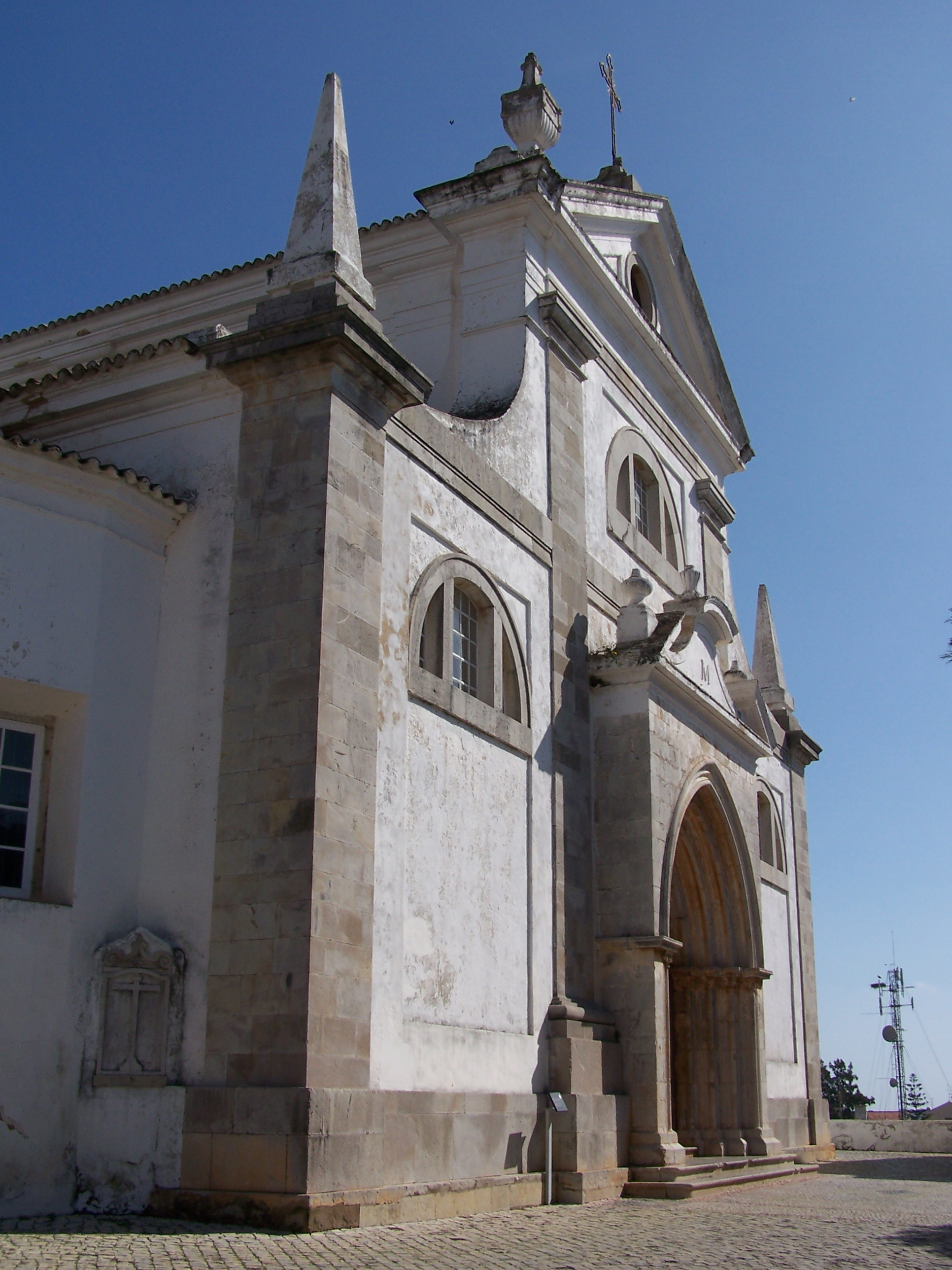 Igreja de Santa Maria de Tavira.